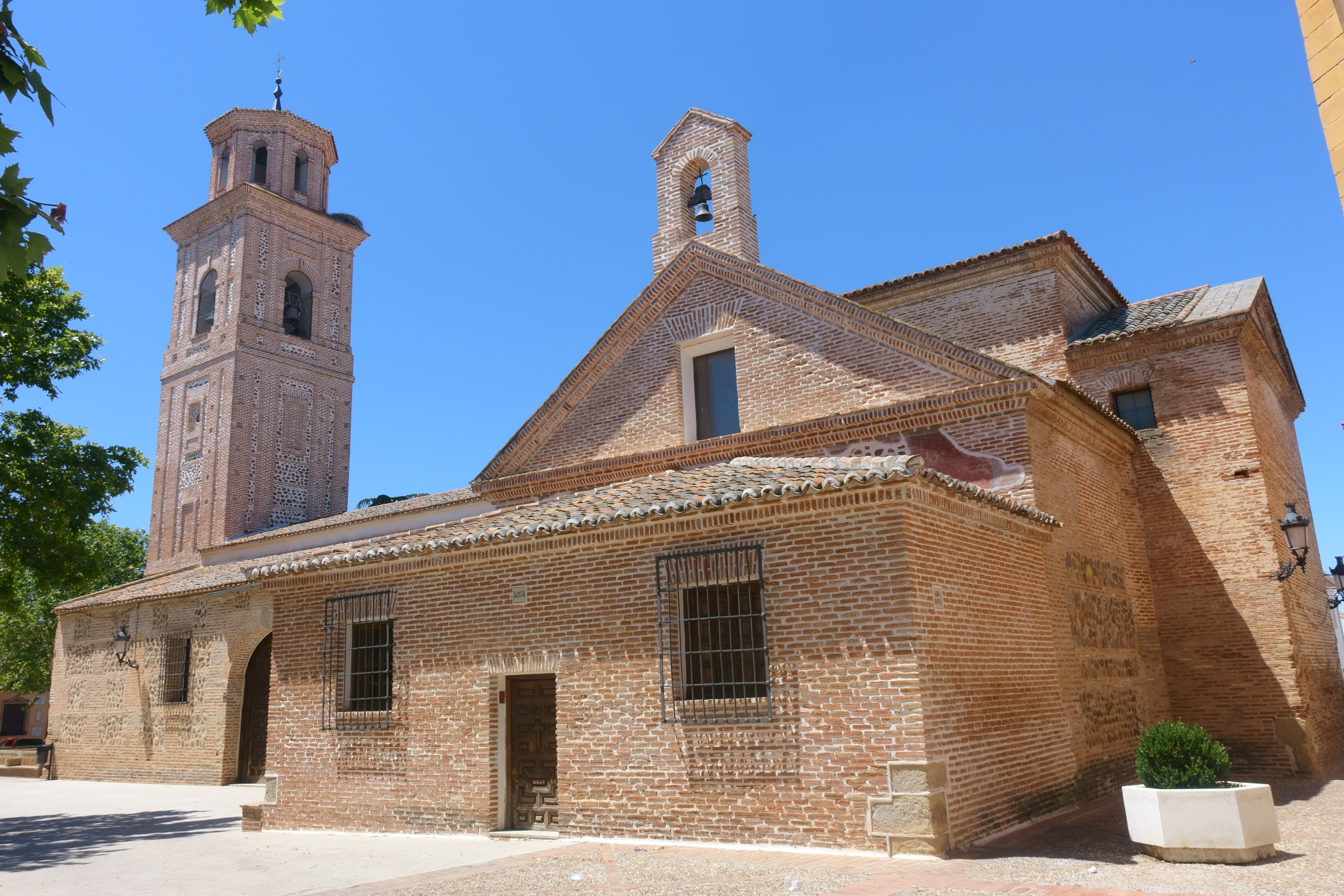 Iglesia de Nuestra Señora de la Encarnación, La Pueblanueva (Toledo, España).